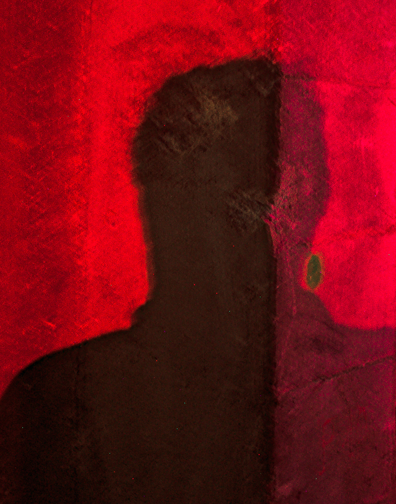 צילום מתוך התערוכה "בין ערפל לצל": דיוקן עצמי